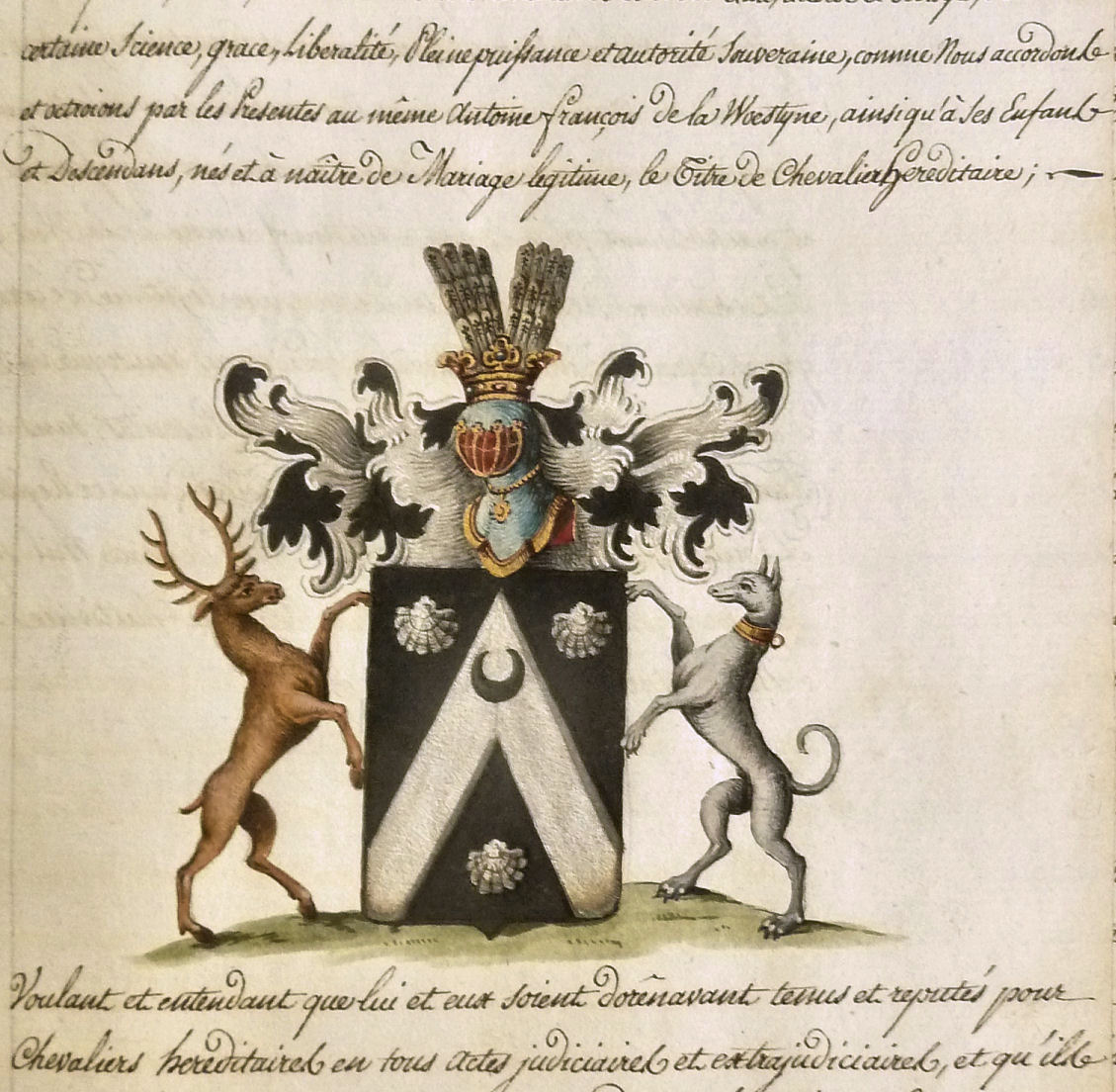 Lettre pattente of the house of vande Woestyne de Becelaere/ Departement voor de Nederlanden van de Hof- en Staatskanselarij.Algemeen Rijksarchief / Archives générales du Royaume